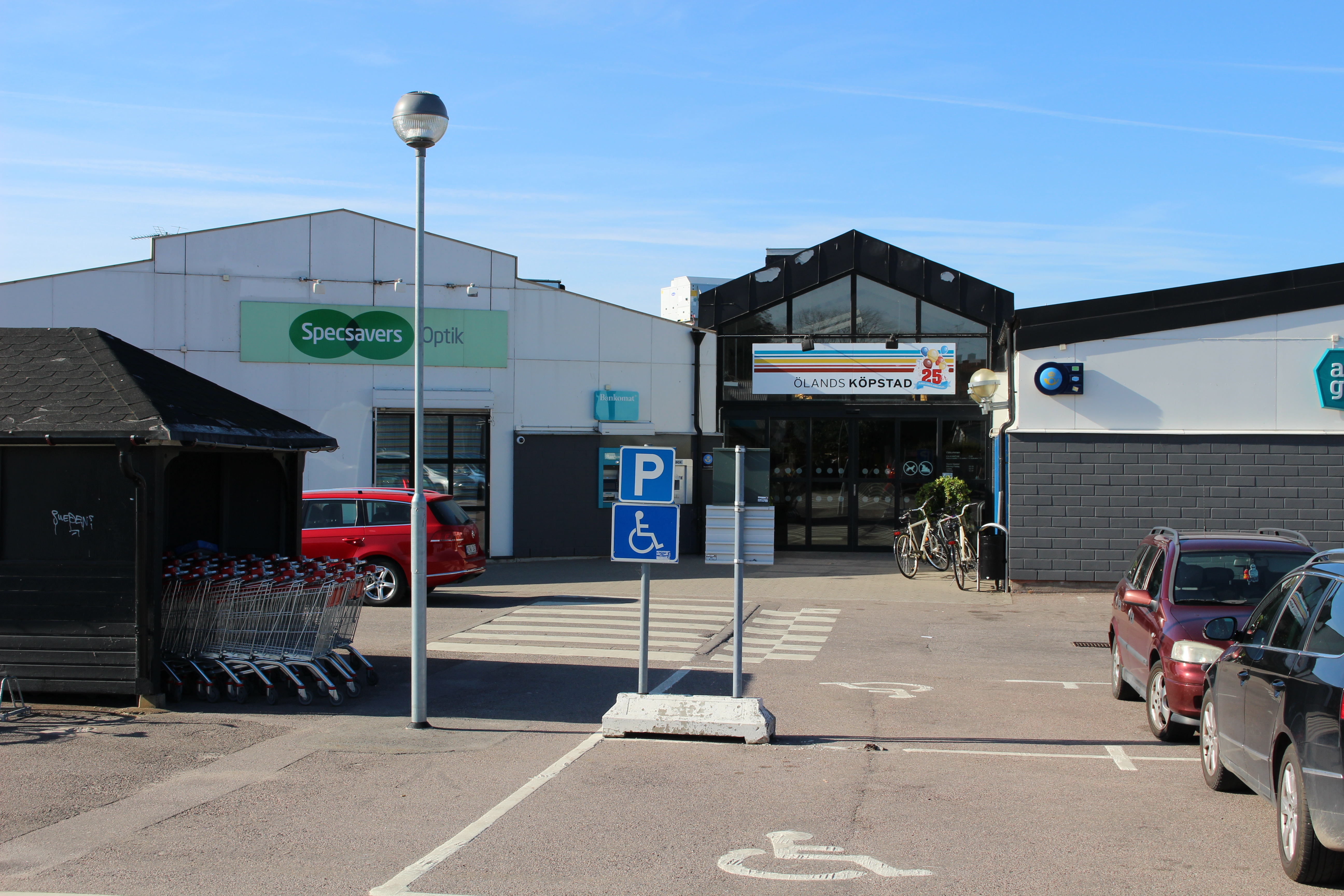 Ölands Köpstad vid södra sidan